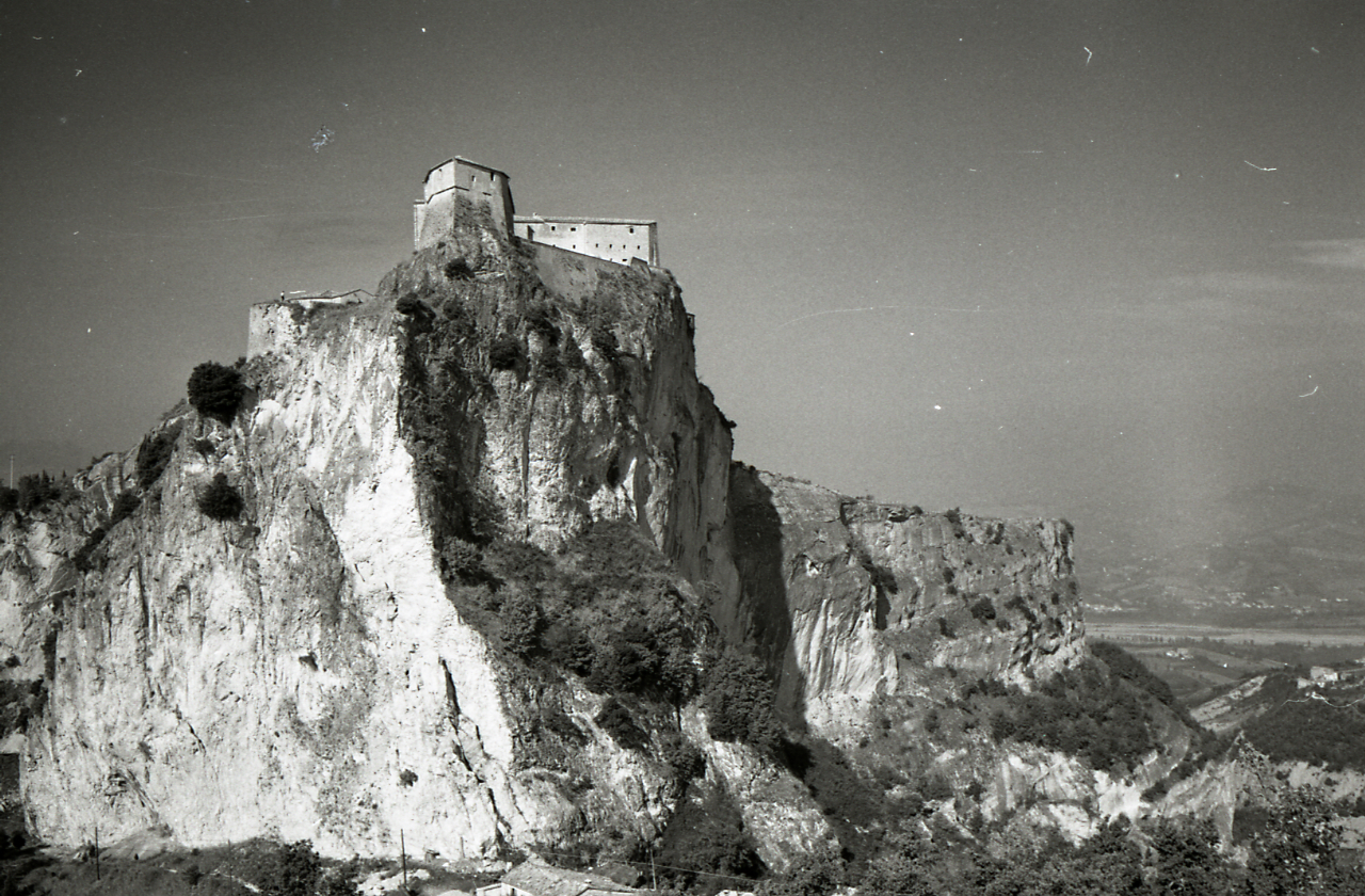 Servizio fotografico : Sassocorvaro, 1969 / Paolo Monti. - Strisce: 3, Fotogrammi complessivi: 14 : Negativo b/n, gelatina bromuro d'argento/ pellicola ; 35 mm. - ((I fotogrammi hanno una doppia numerazione. . - Sul portanegativi: Nikon. - All'interno del portanegativi Monti specifica: "Fine viaggio Marche". - Occasione: Documentazione per la pubblicazione: "TOURING CLUB ITALIANO, Marche, Milano, TCI, 1971". - di Paolo Monti: Monti - Agenda 1969 (1969), presso Archivio Paolo Monti. - Fonte: Agenda di Paolo Monti: Monti/ 3 aprile 1966 - 9 marzo 1971/ 12421-16823 (1966-1971), presso Archivio Paolo Monti. - Fonte: Monografia: TOURING CLUB ITALIANO, Marche, Milano, TCI, 1971 (1971). - Fonte: Agenda